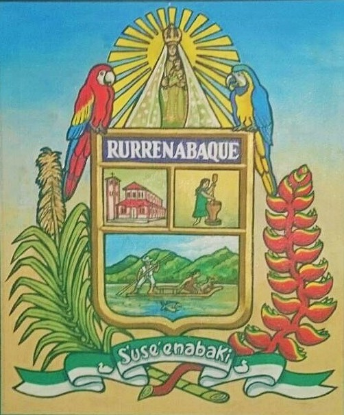 Escudo de Rurrenabaque